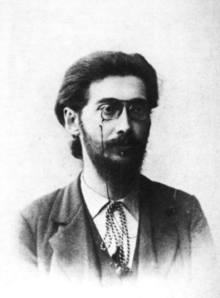 جوستاف لانداور